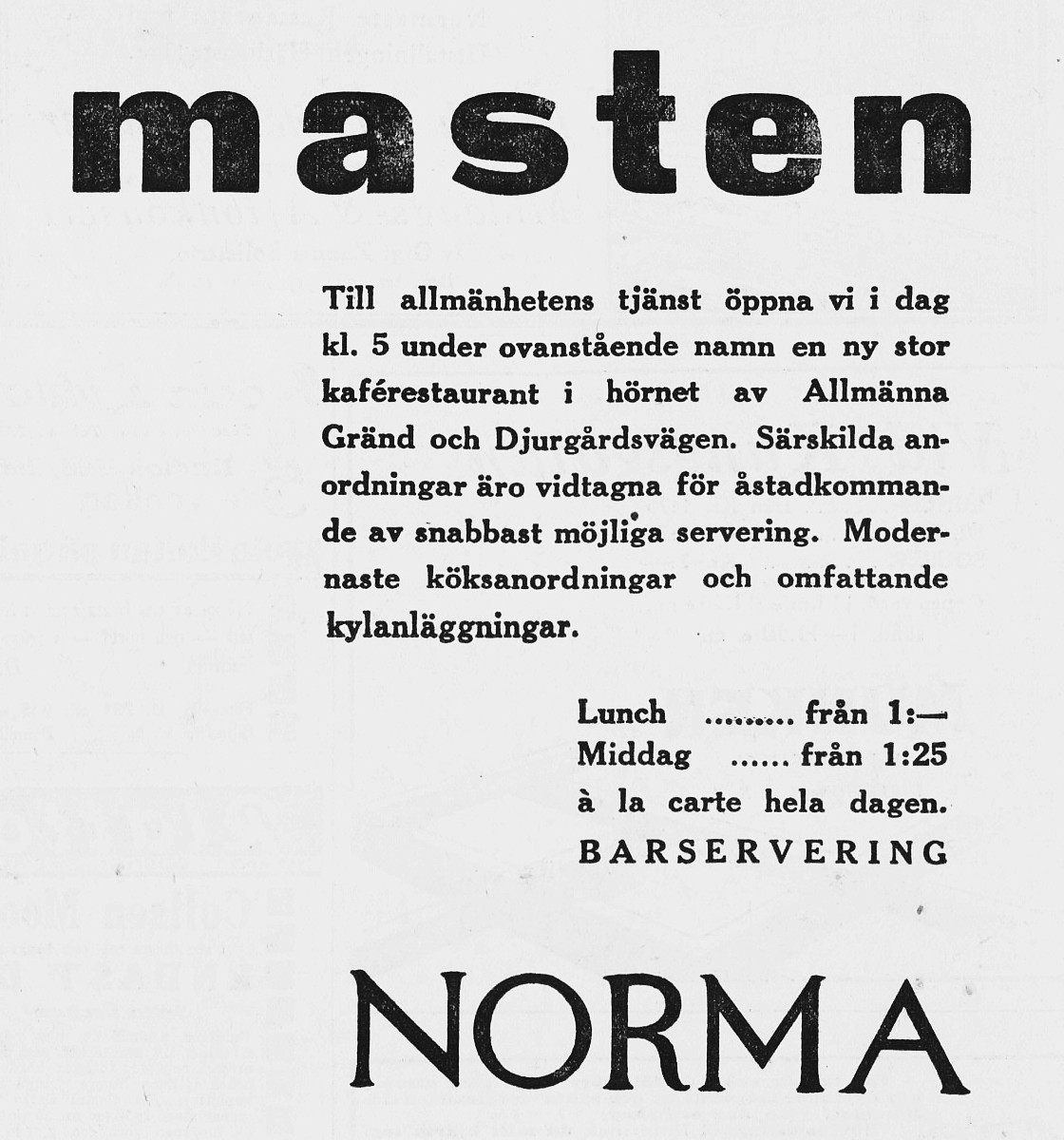 Restaurang masten på Djurgården invigning 1930